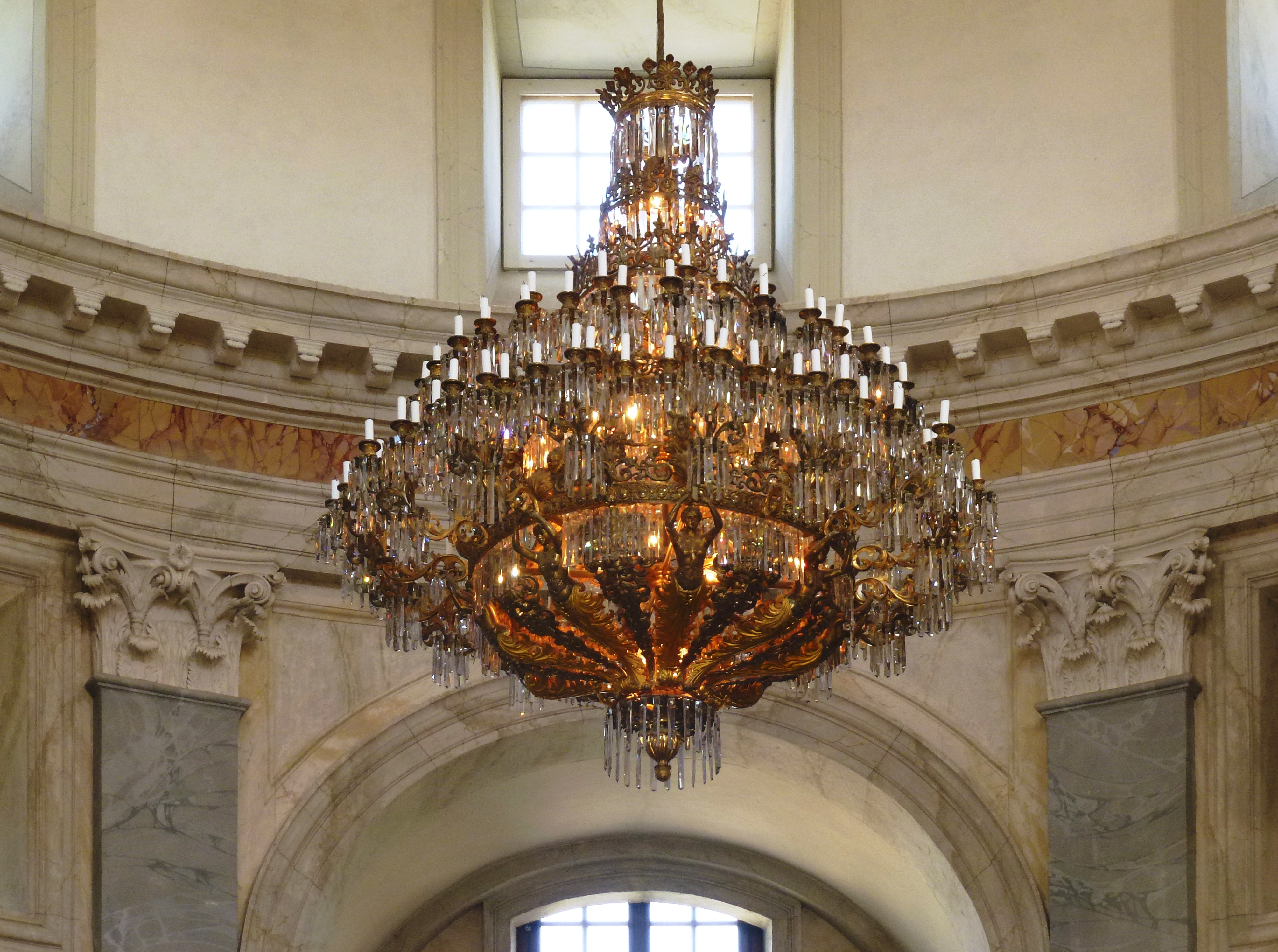 Drottningholms slottskyrka takkronan